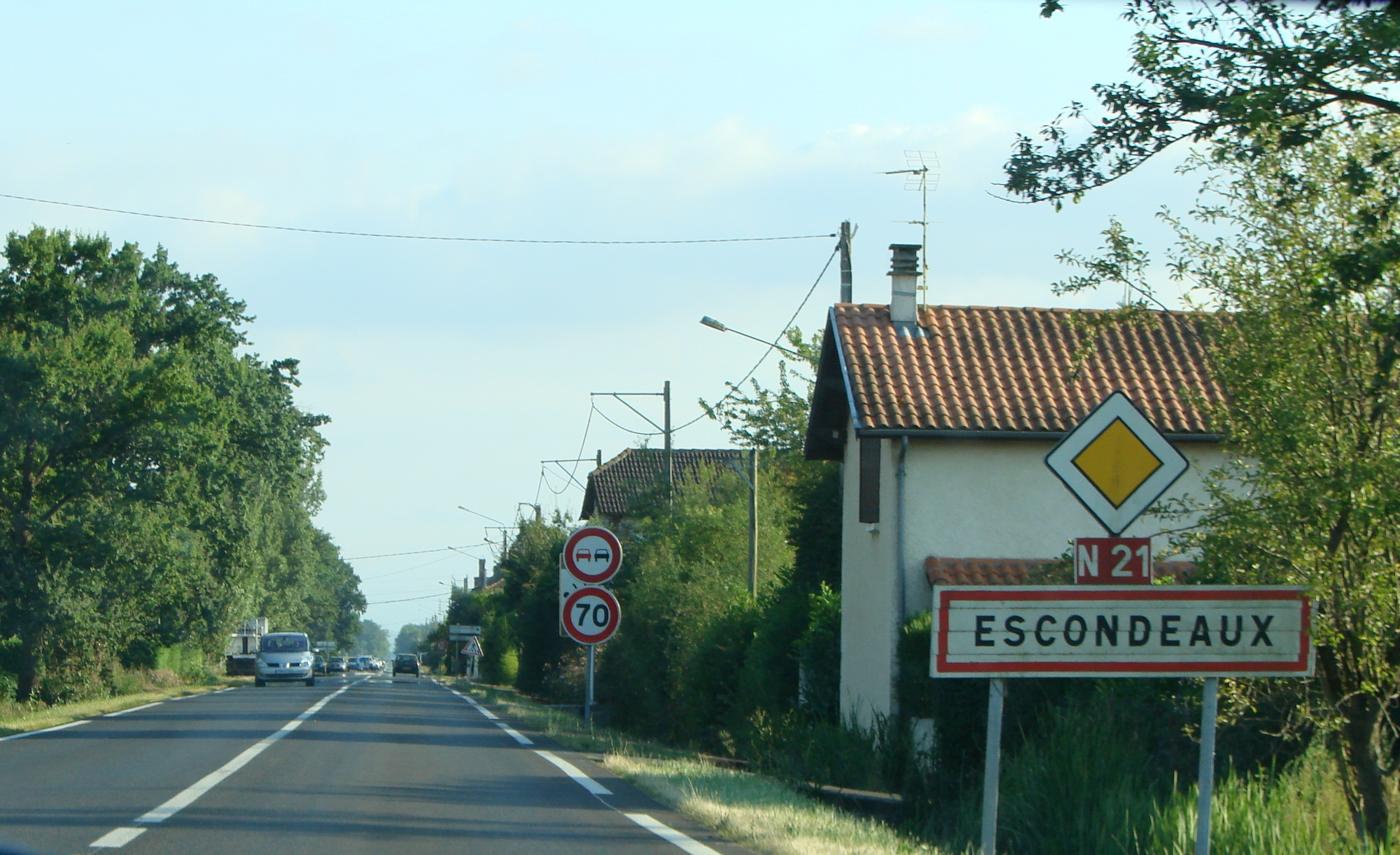 Vue du village de Escondeaux dans les Hautes-Pyrénées (France) : Entrée du village en venant de Rabastens-de-Bigorre